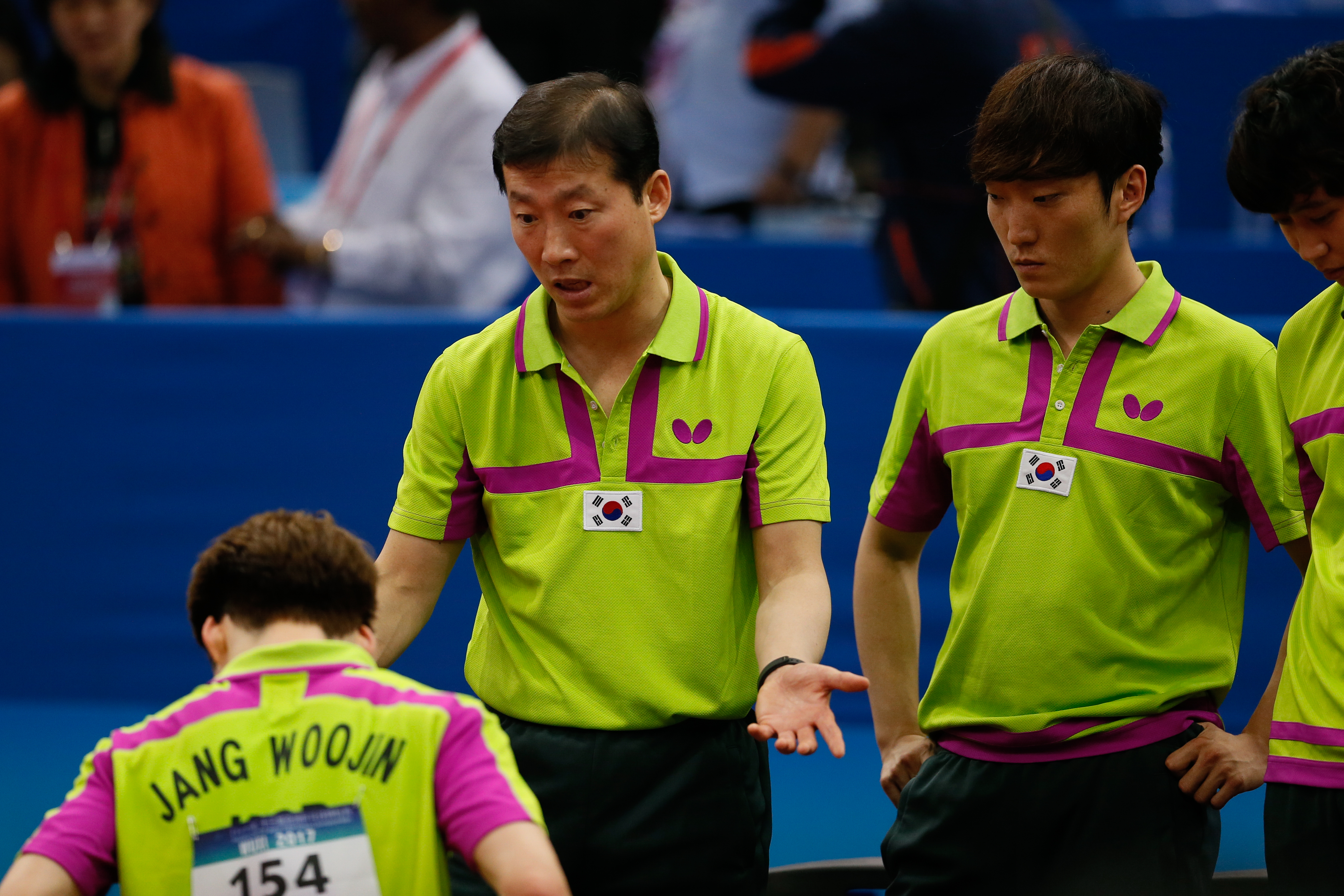 _K0K0313